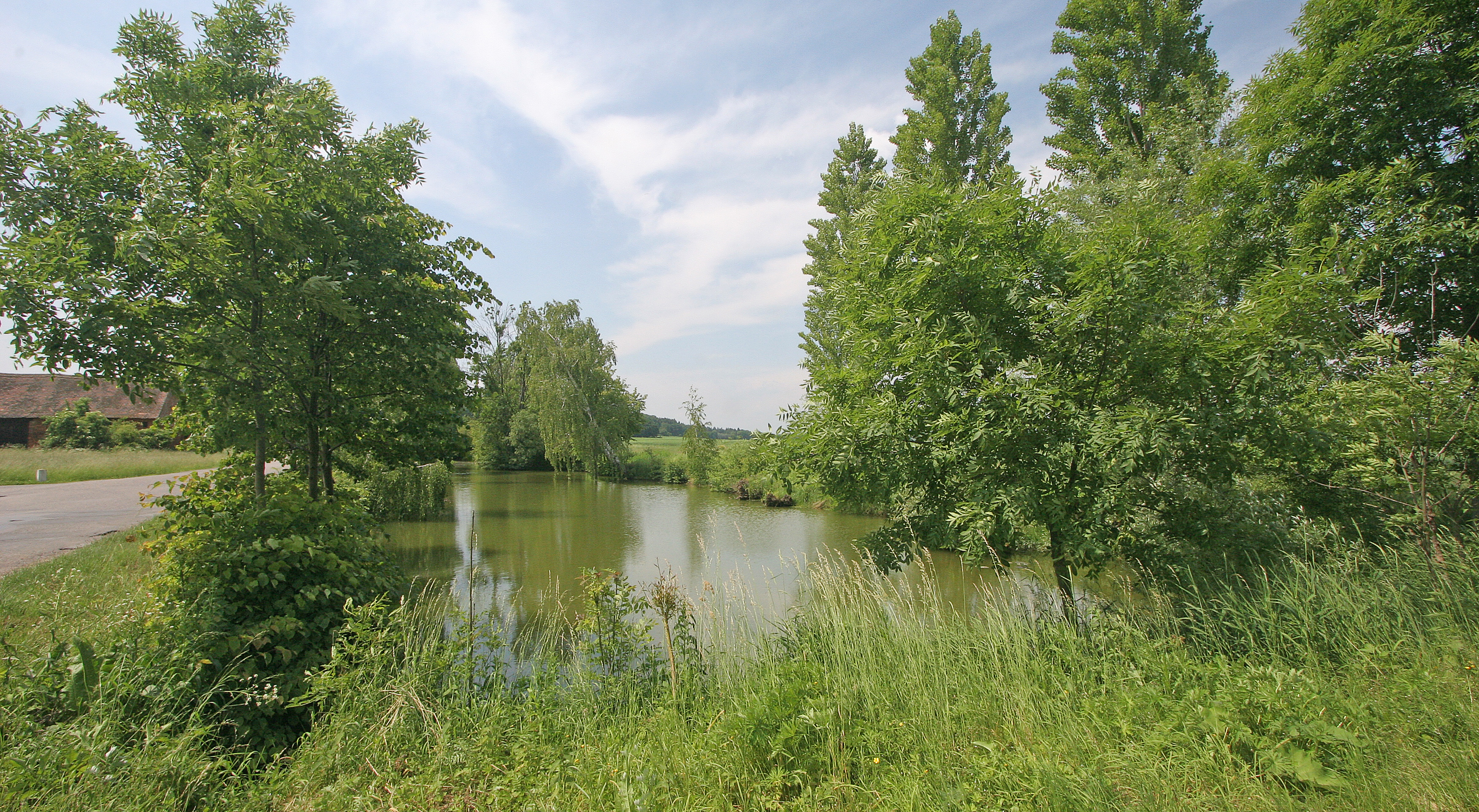 Želí rybníček